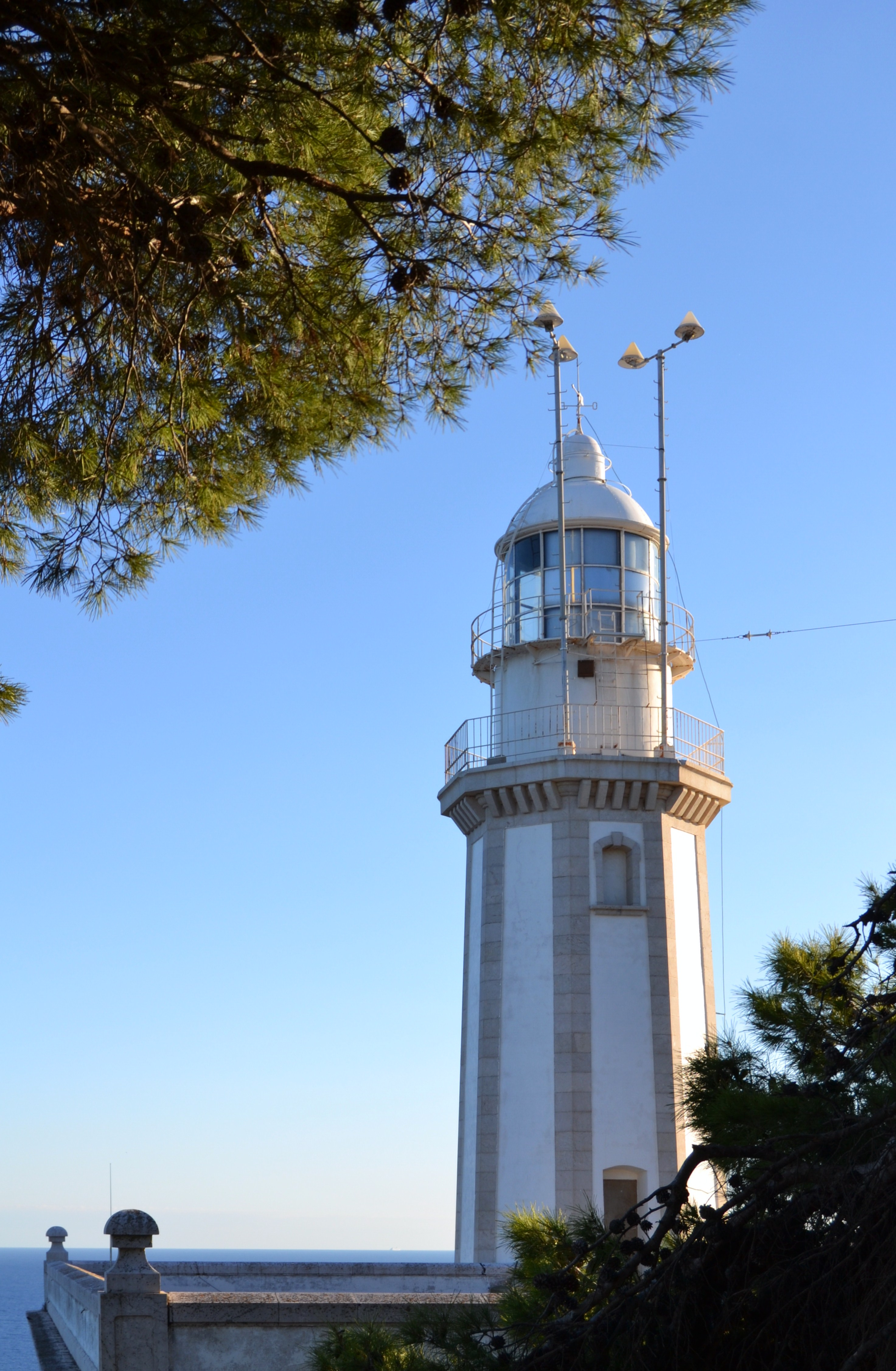 Far del cap de la Nau, Xàbia.